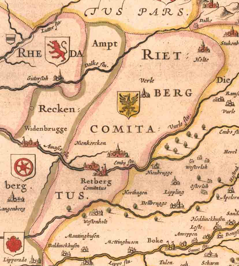 Karte der Grafschaft Rietberg aus dem "Theatrum orbis terrarum, sive, Atlas novus" von Willem Janszoon und Joan Blaeu, erstellt 1645 bis 1662.